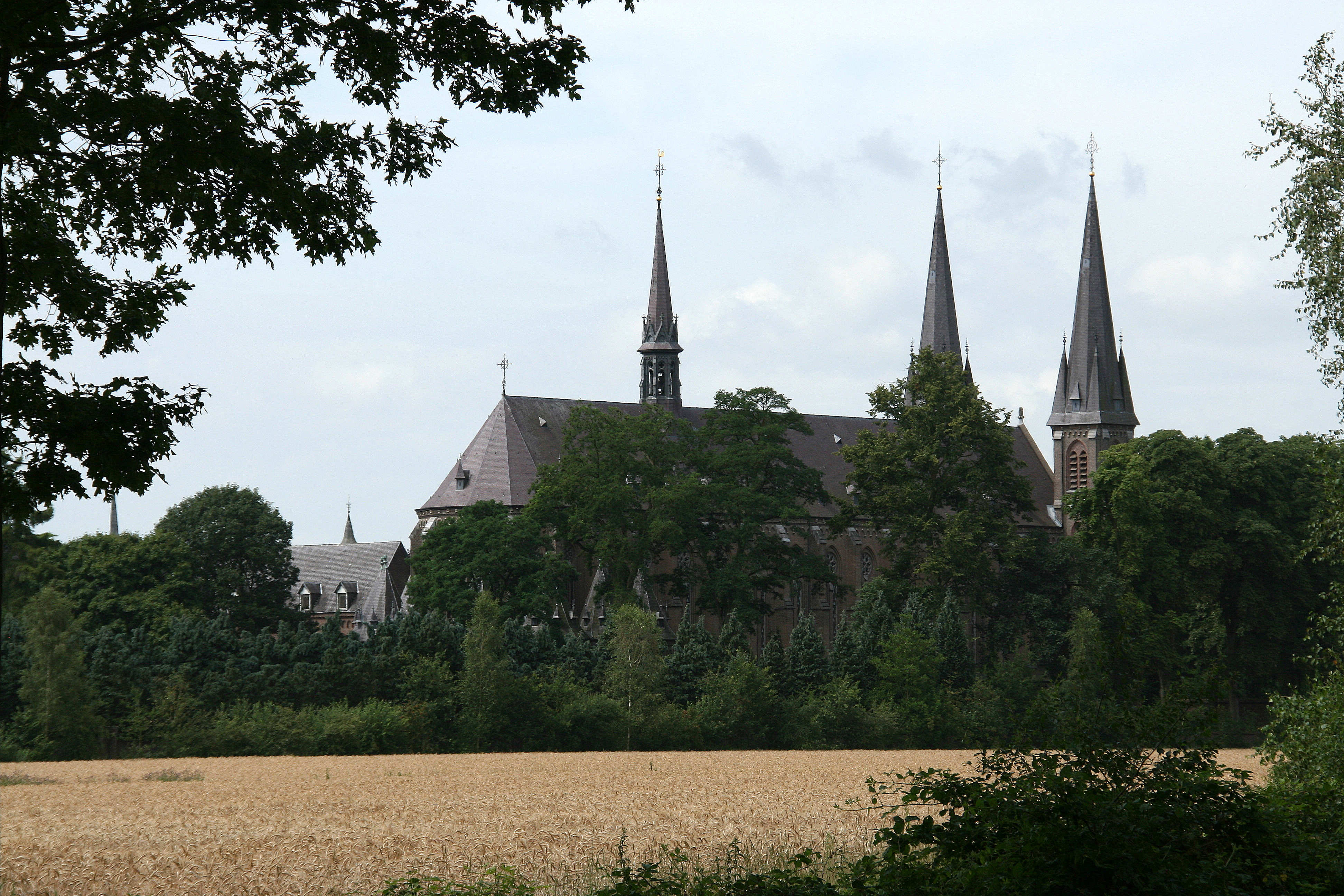 Aan de noordzijde staat de eenbeukige, langgerekte abdijkerk met een door twee torens geflankeerde westgevel in de trant van de 13de-eeuwse gotiek. De aan de kloostergang gelegen kapittelzaal stamt uit 1929.